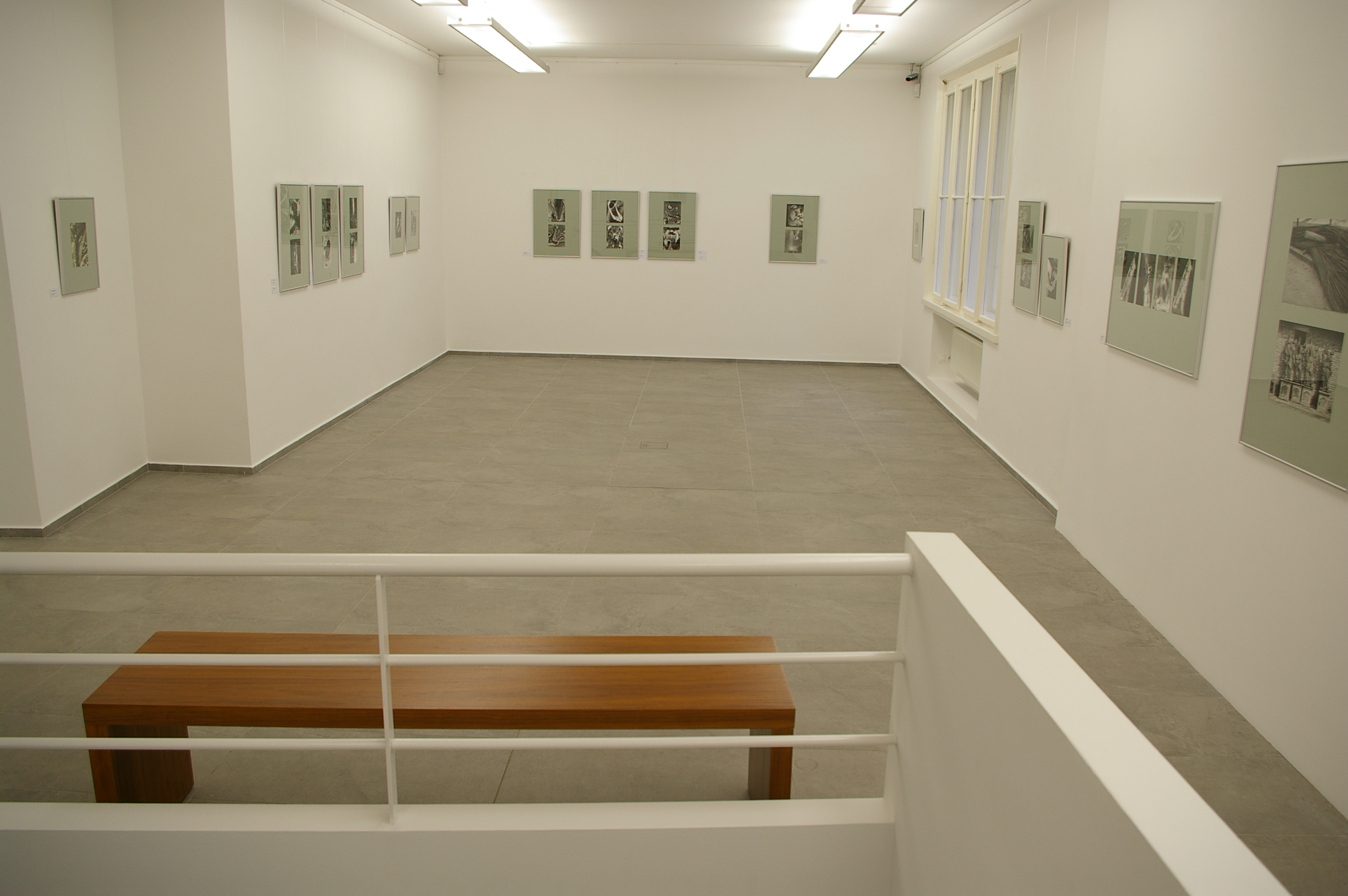 Mesiac fotografie Bratislava 2013 Výstava